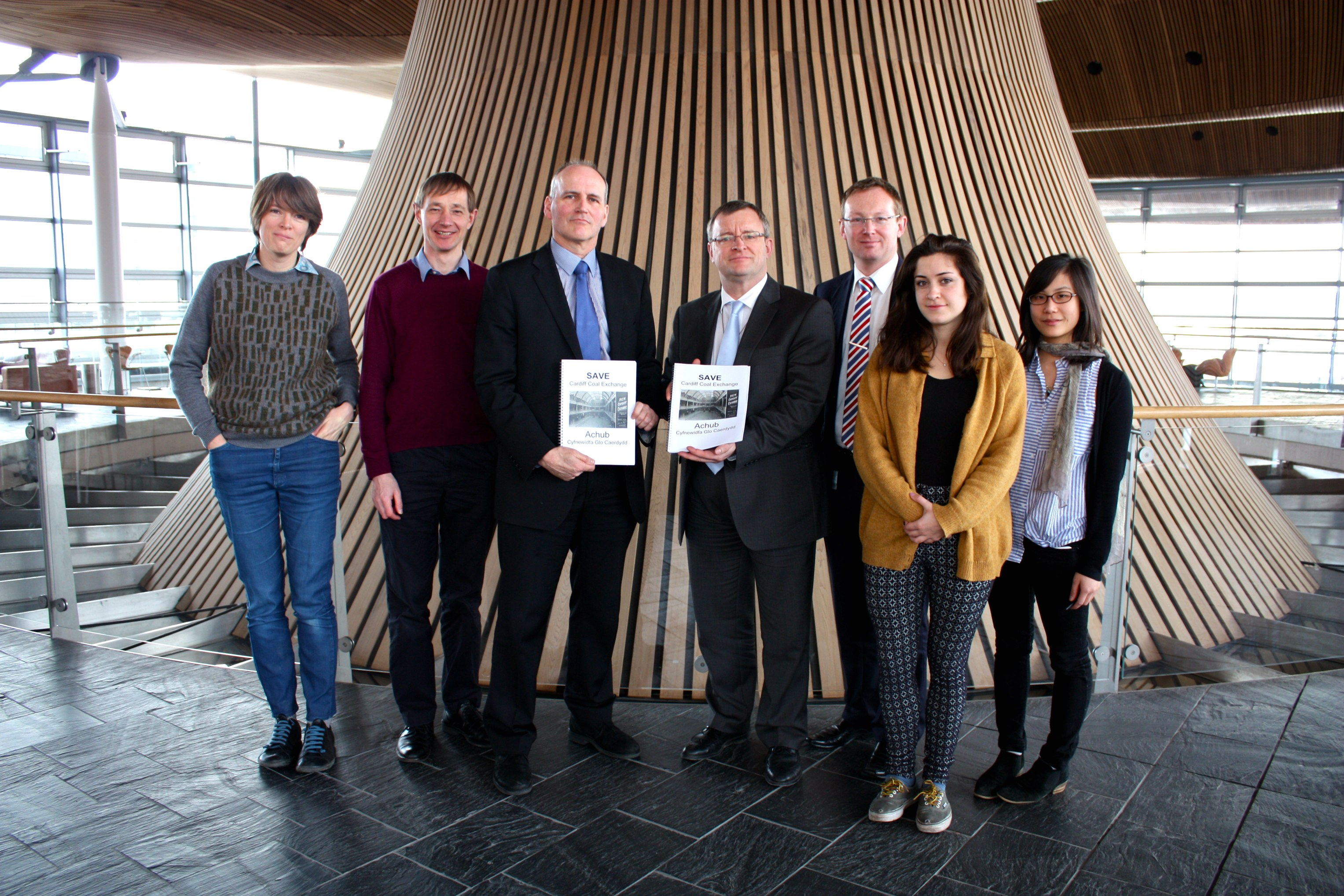 Save the Cardiff Coal Exchange / Achub Cyfnewidfa Glo Caerdydd 5/3/2014